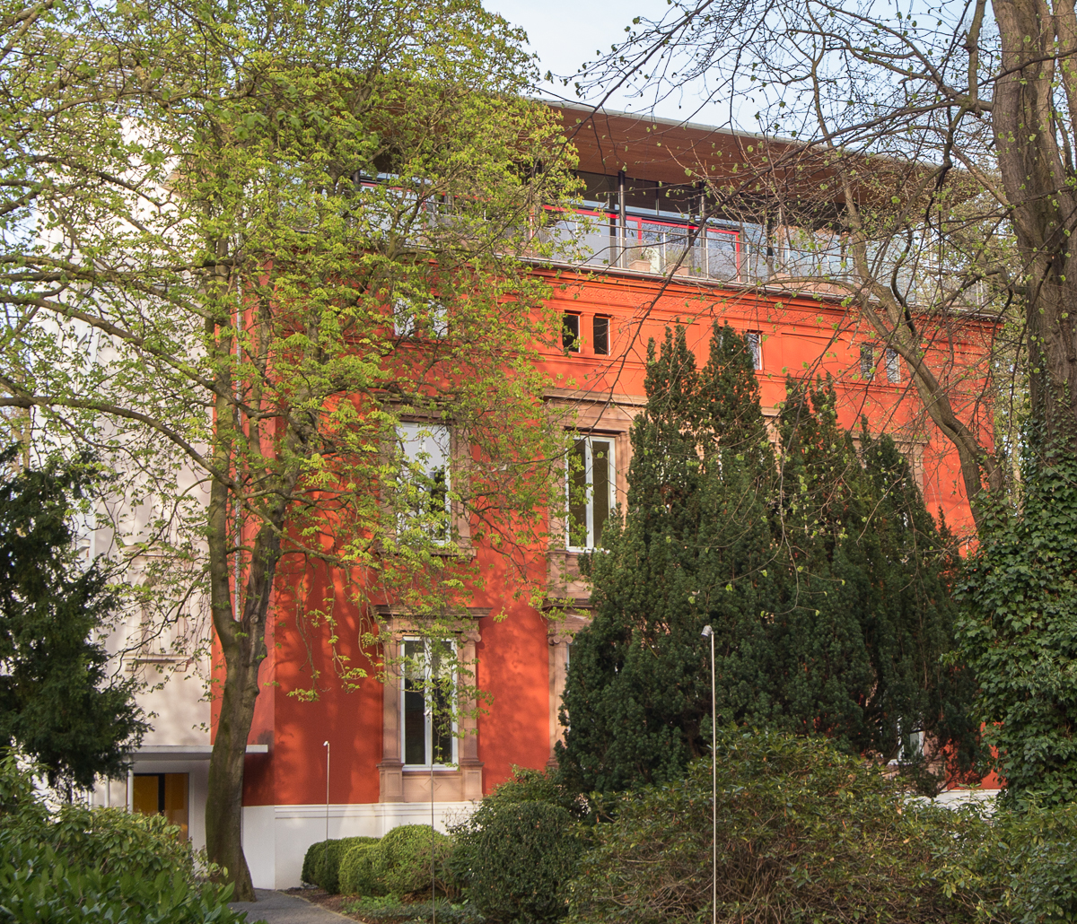 Villa Prieger, Raiffeisenstraße 2–4, Bonn: Ansicht aus Süd-West